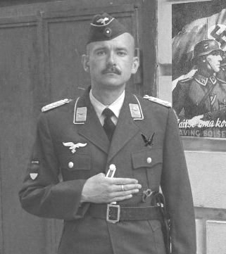 Лётчик эстонского подразделения люфтваффе